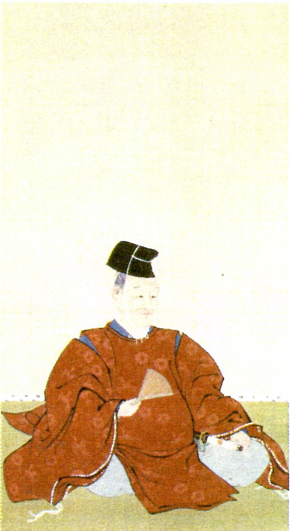 浅野長直の肖像。